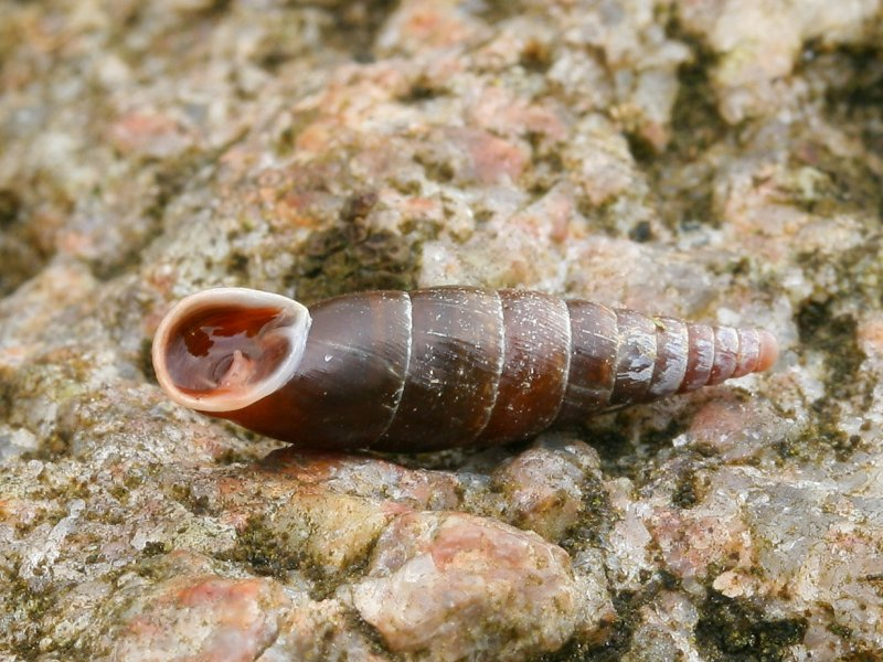 Glatte Schließmundschnecke (Cochlodina laminata)